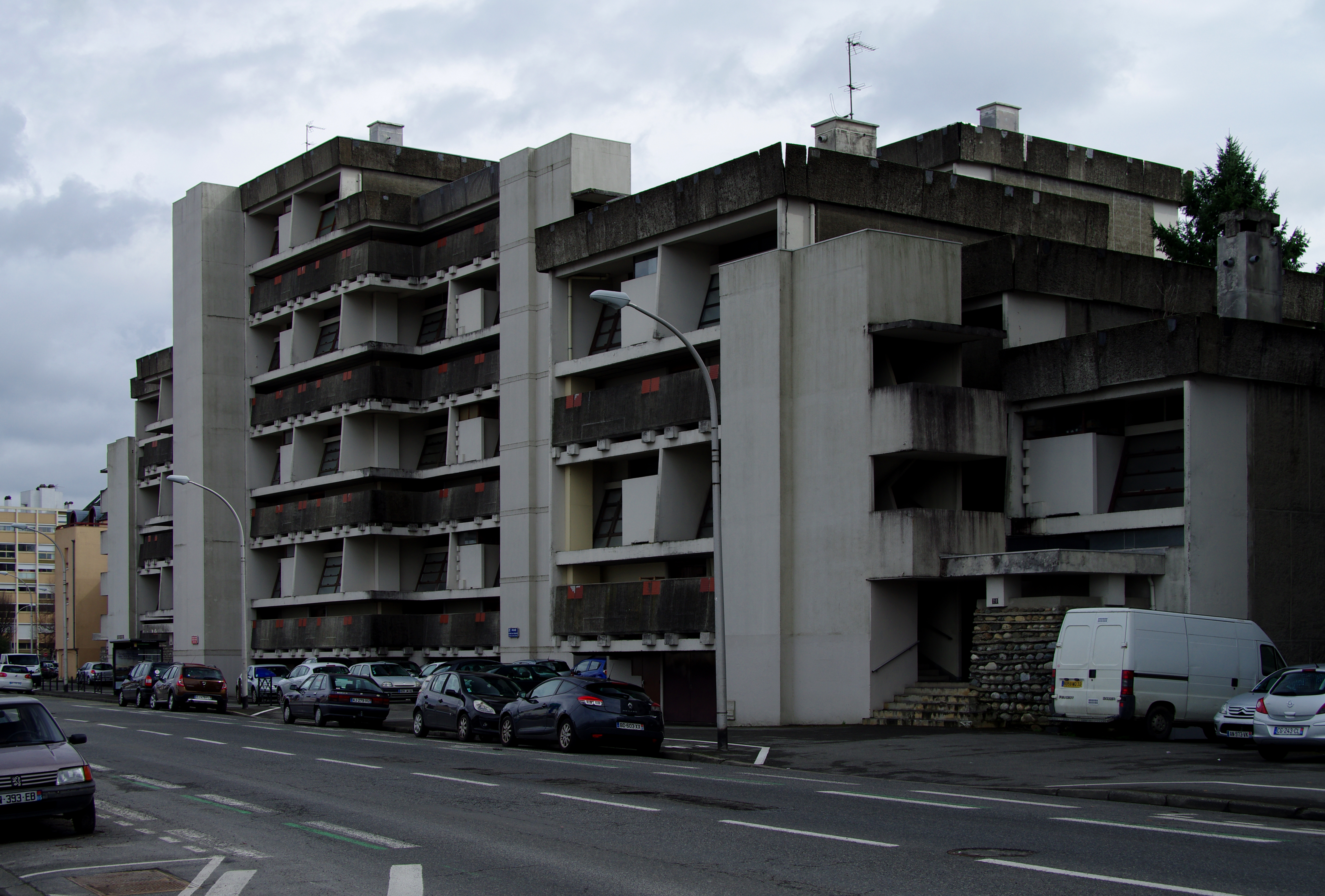 Immeuble conçu par Edmond Lay